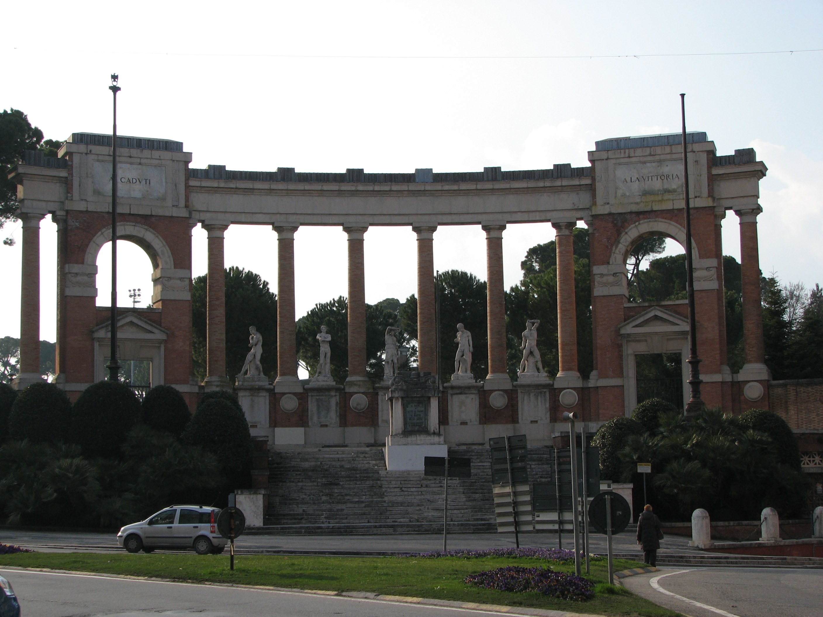 Monumento ai Caduti in Macerata, Italy (Cesare Bazzani, 1932)